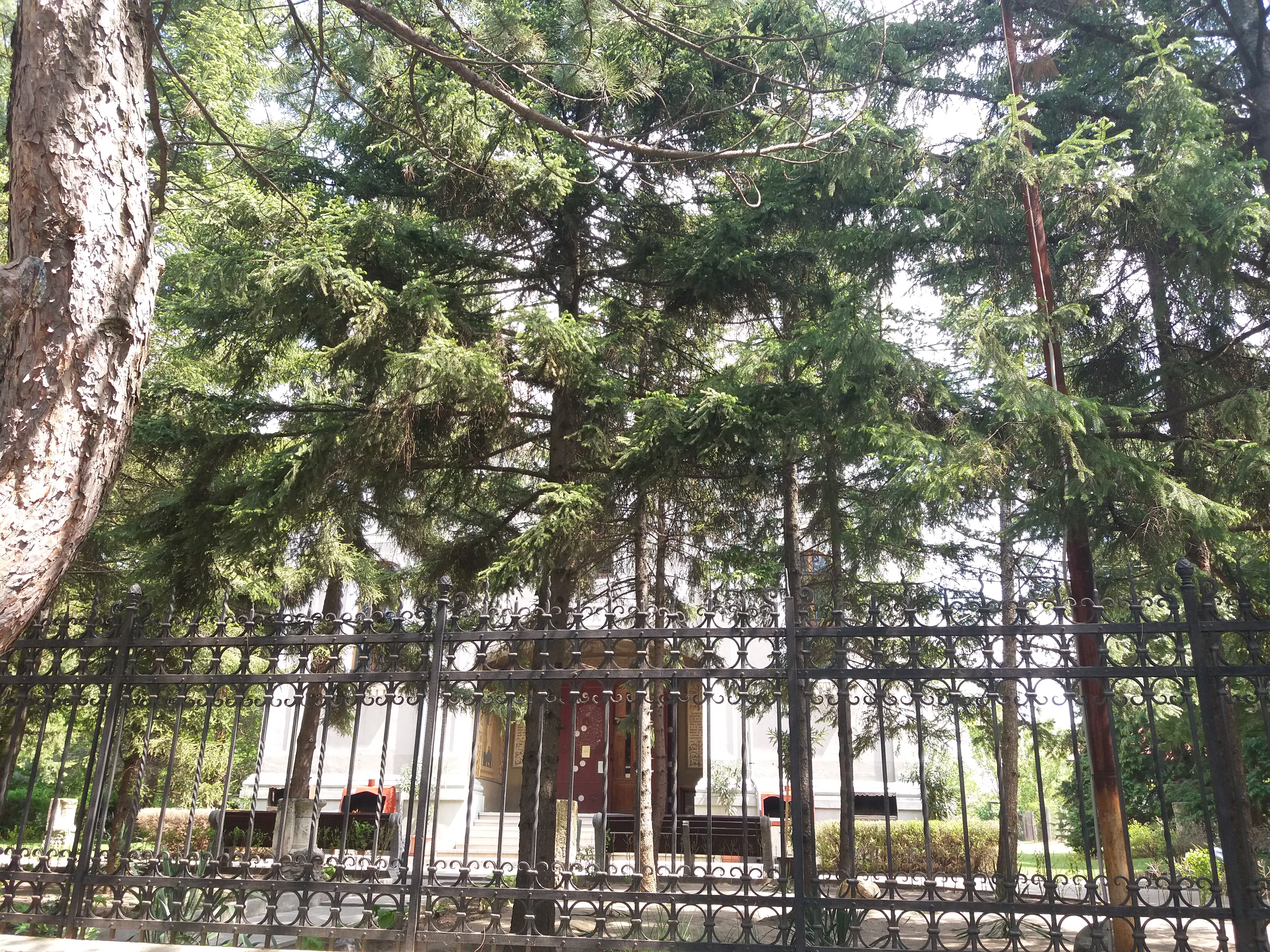 Biserica Izvorul Tămăduirii din Calafat, România